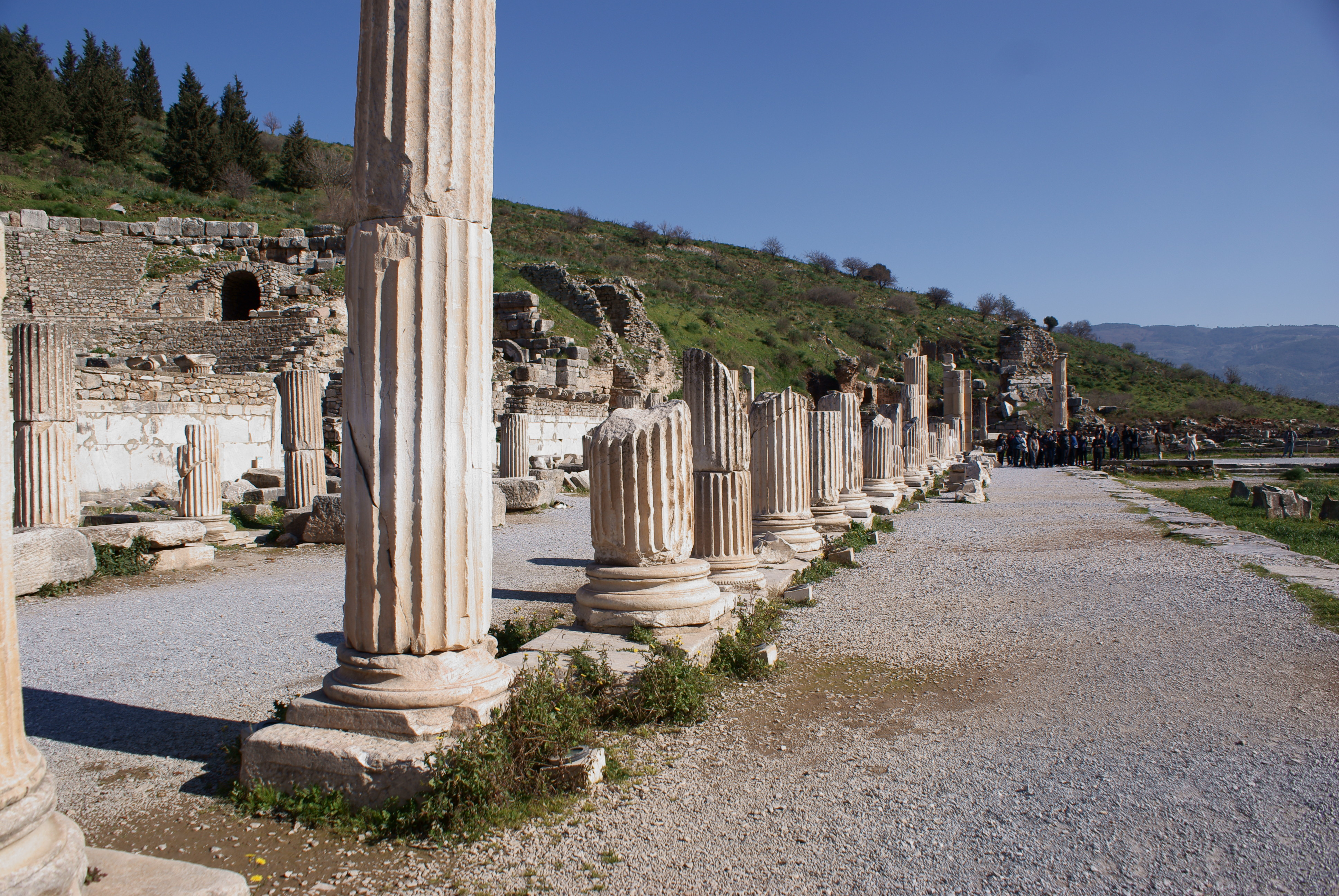 Efes (Ephesos)